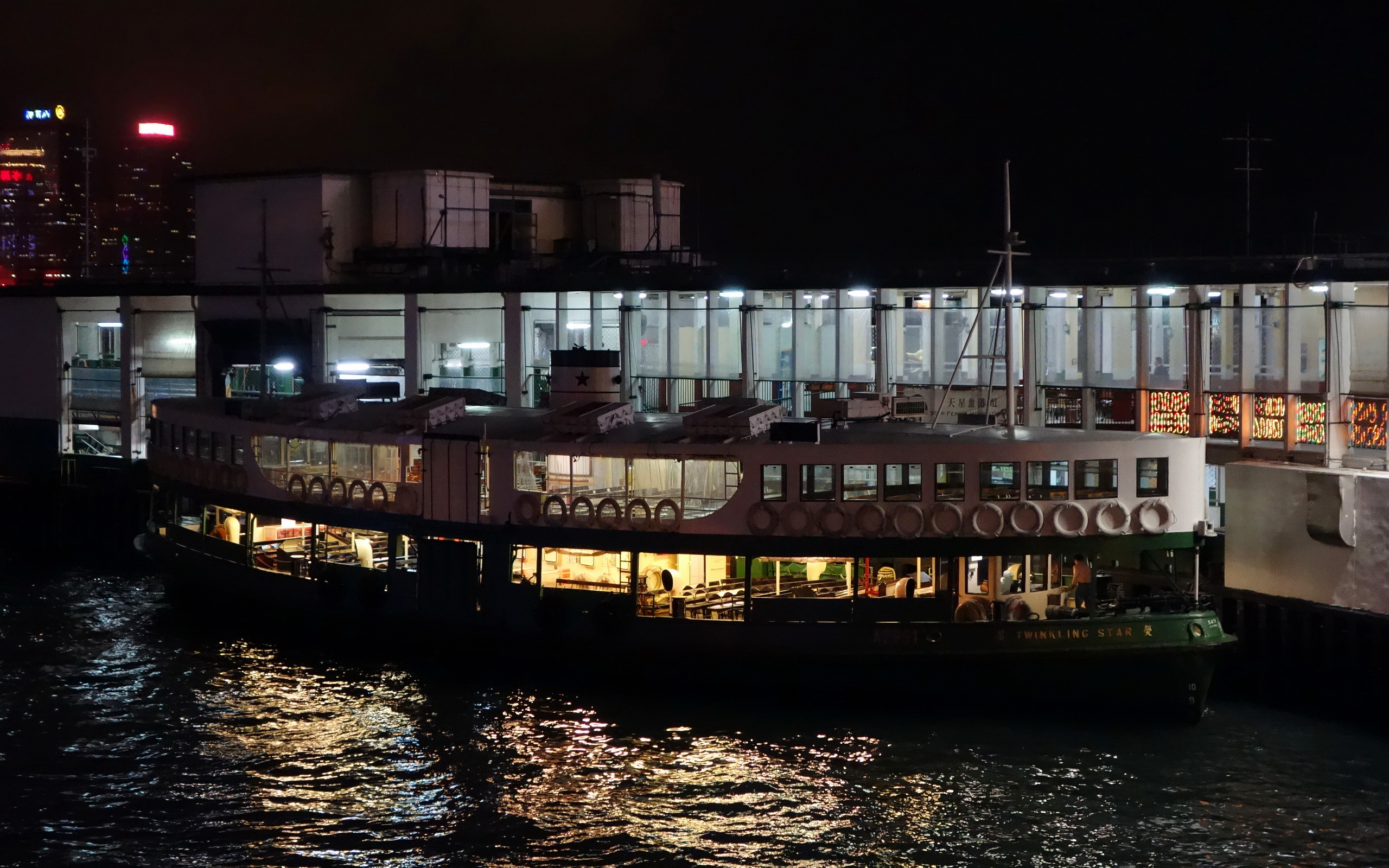 天星小轮 荧星（Twinkling Star），在尖沙咀天星码头